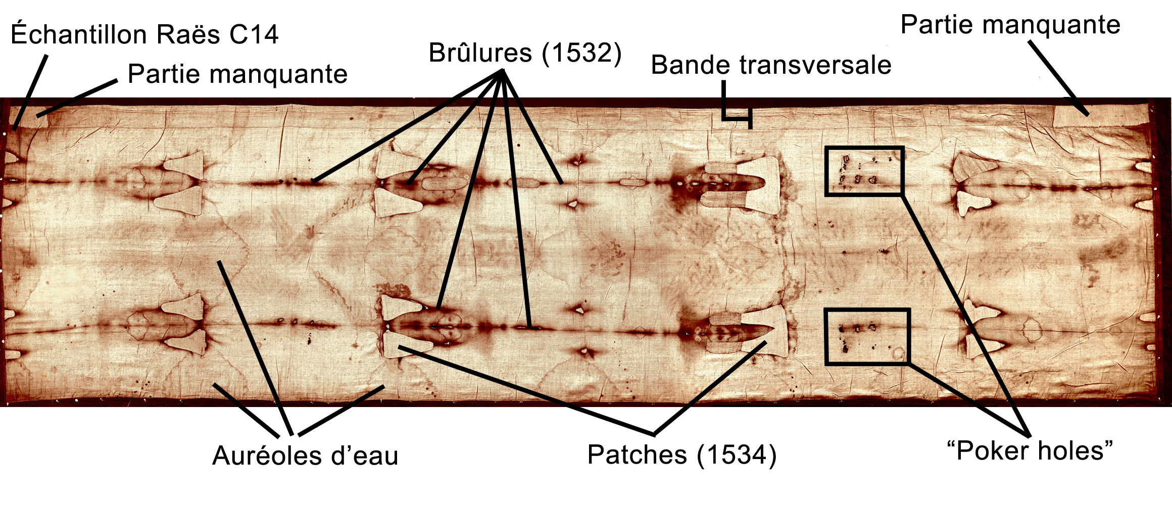 Shroudofturin rotated avec légende